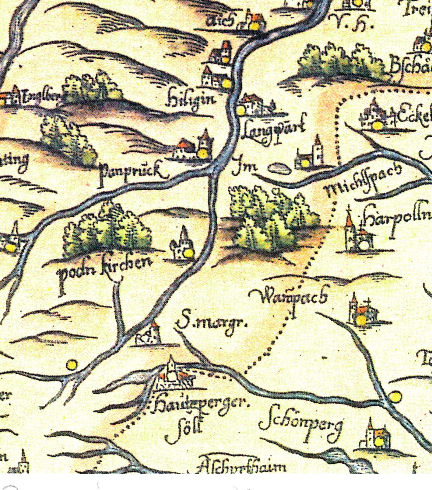 Karte von Peter Weinerus nach Apians Landtafel, Holzschnitt 1579 Haunzenbergersöll Bodenkirchen Schönberg Margarethen Bonbruck Oberweinbach Hilling Aich